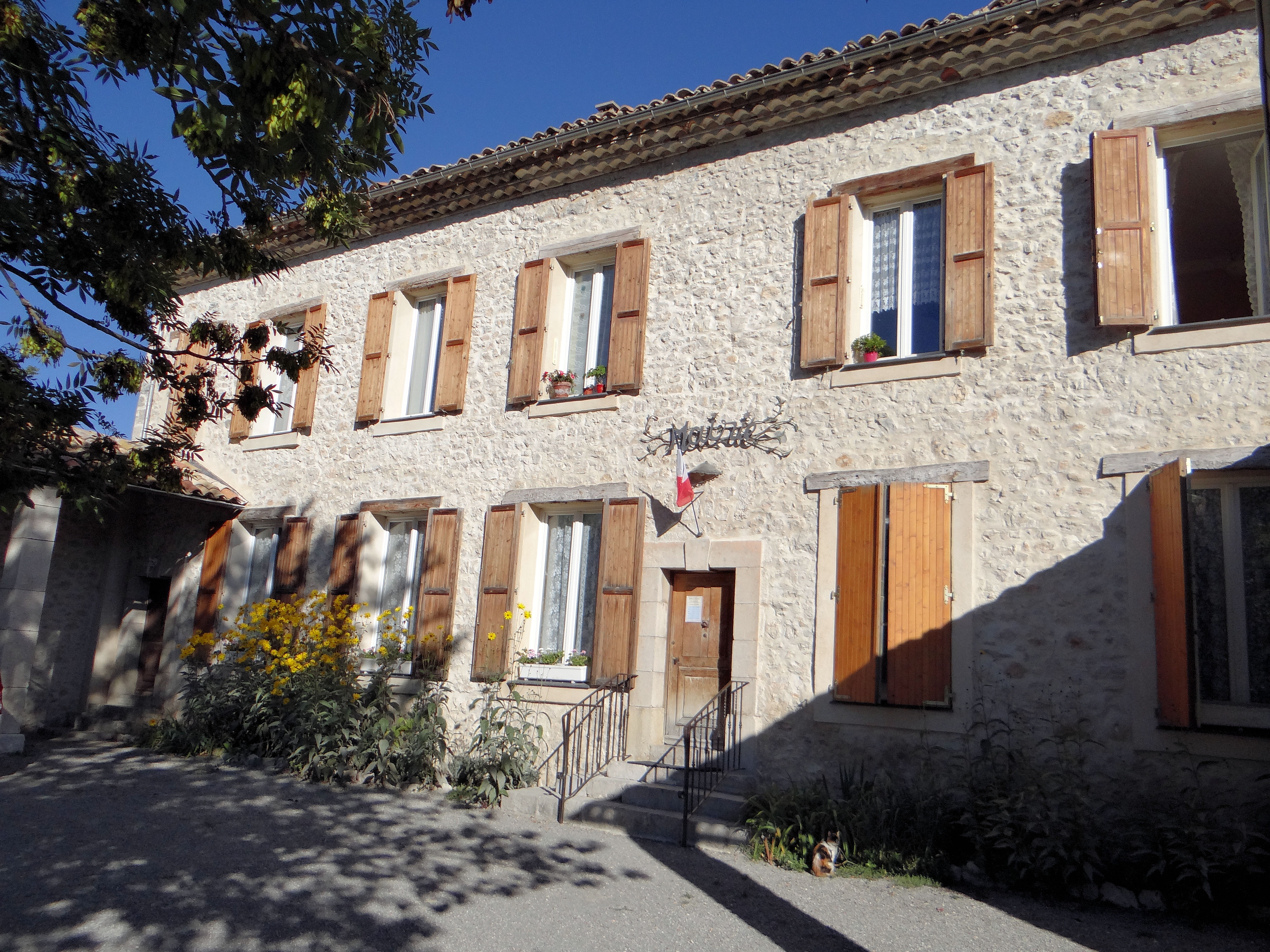 Soleilhas - Mairie